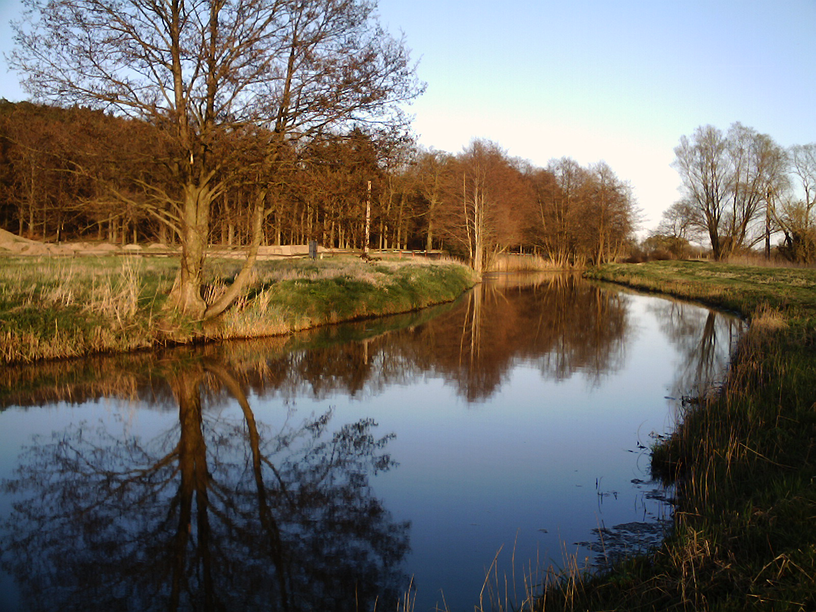 Die Ziese bei Wolgast, ein etwa 20 Kilometer langer Bach in Mecklenburg-Vorpommern